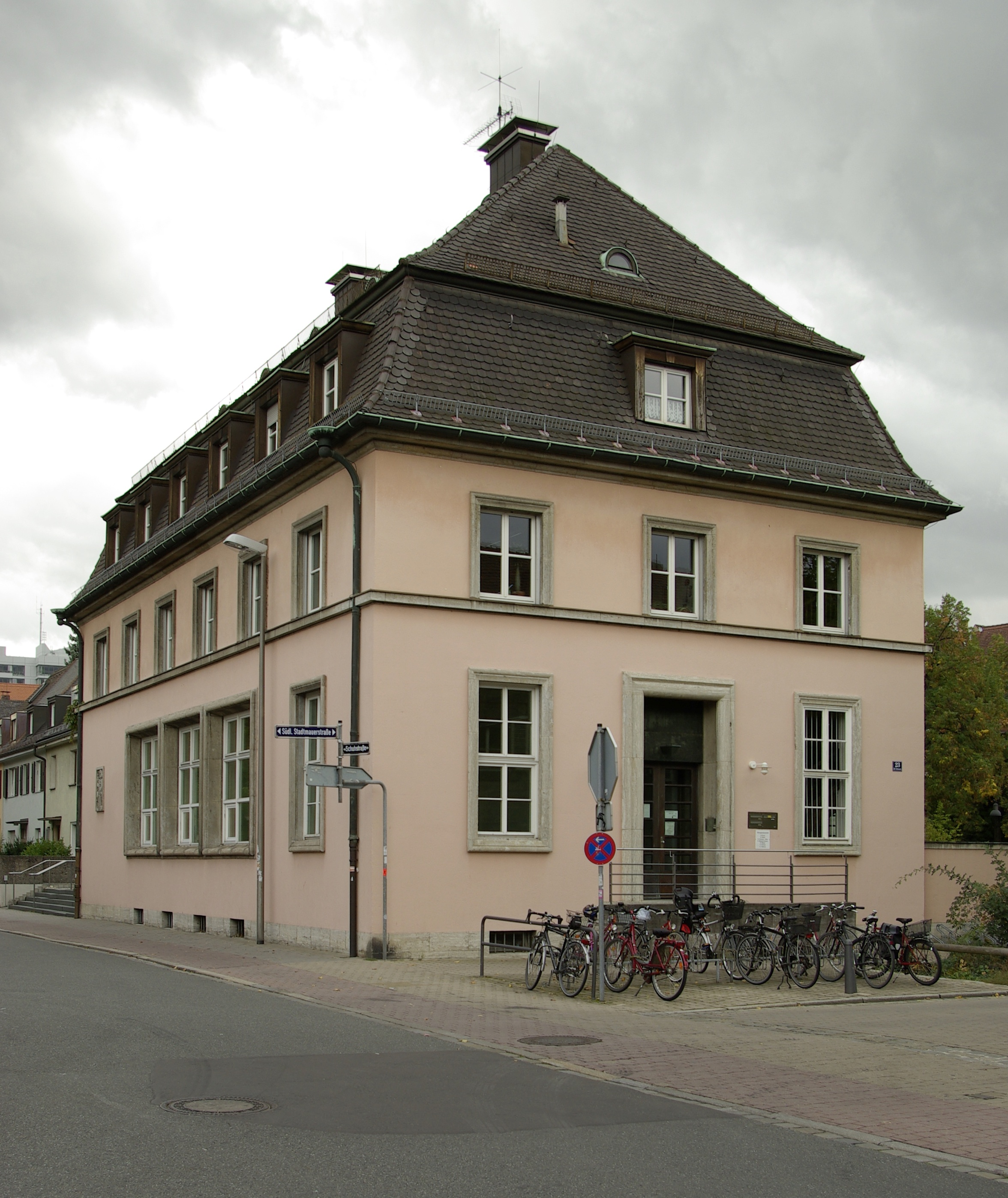 Ehemalige Landeszentralbank, Schuhstraße 14, Erlangen.